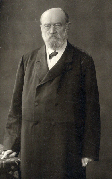 Wenzel Lustkandl (1832 - 1906), Rakouský právník a politik.